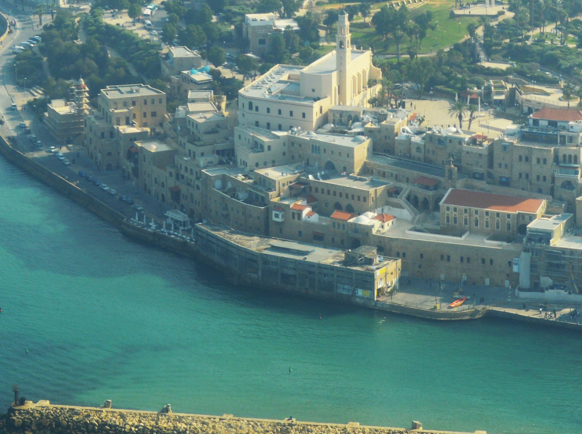 בית המכס הצפוני